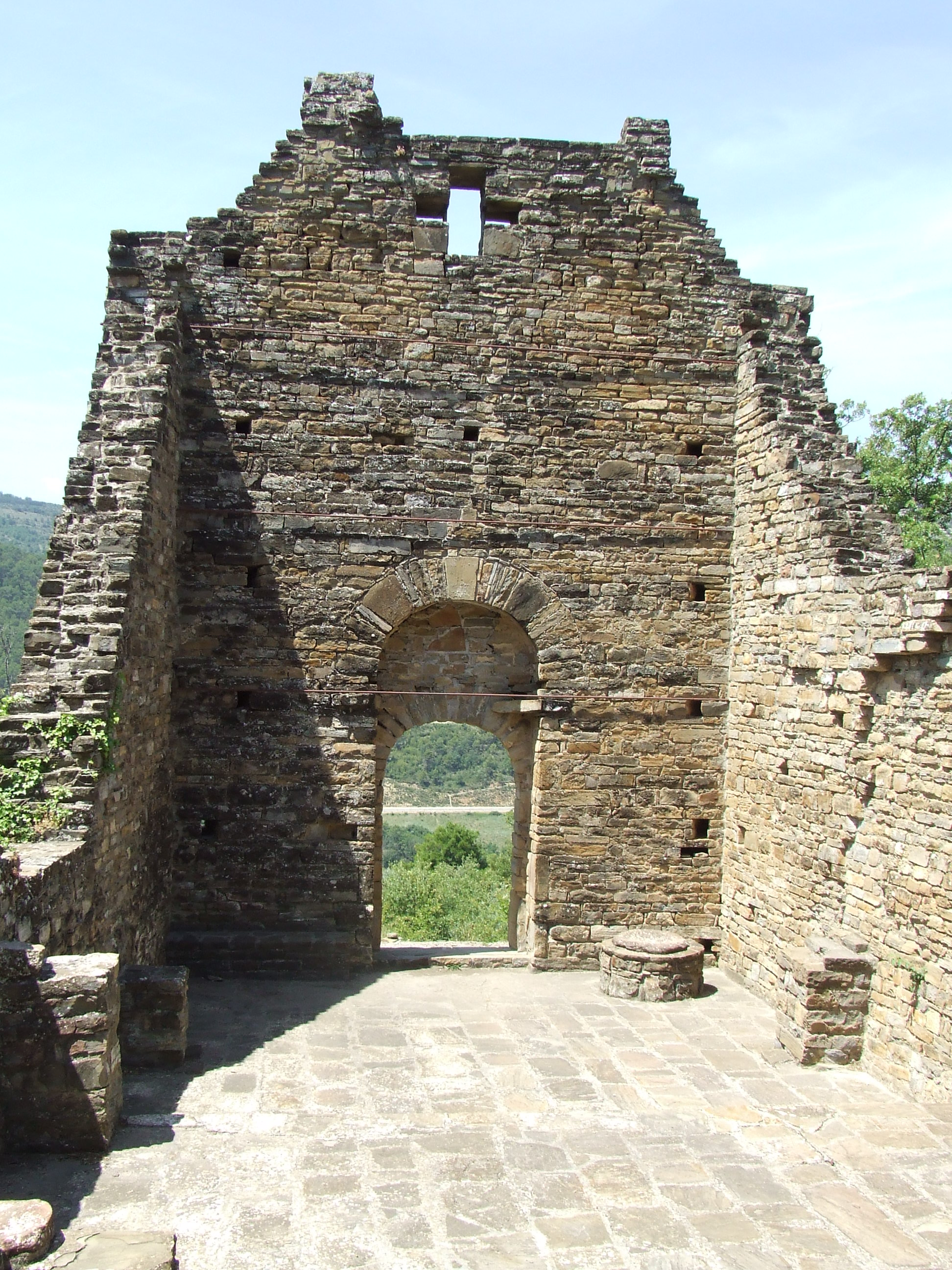 Peus de la nau, per dins, de Sant Miquel del Pui Vell (la Pobla de Segur, Pallars Jussà)